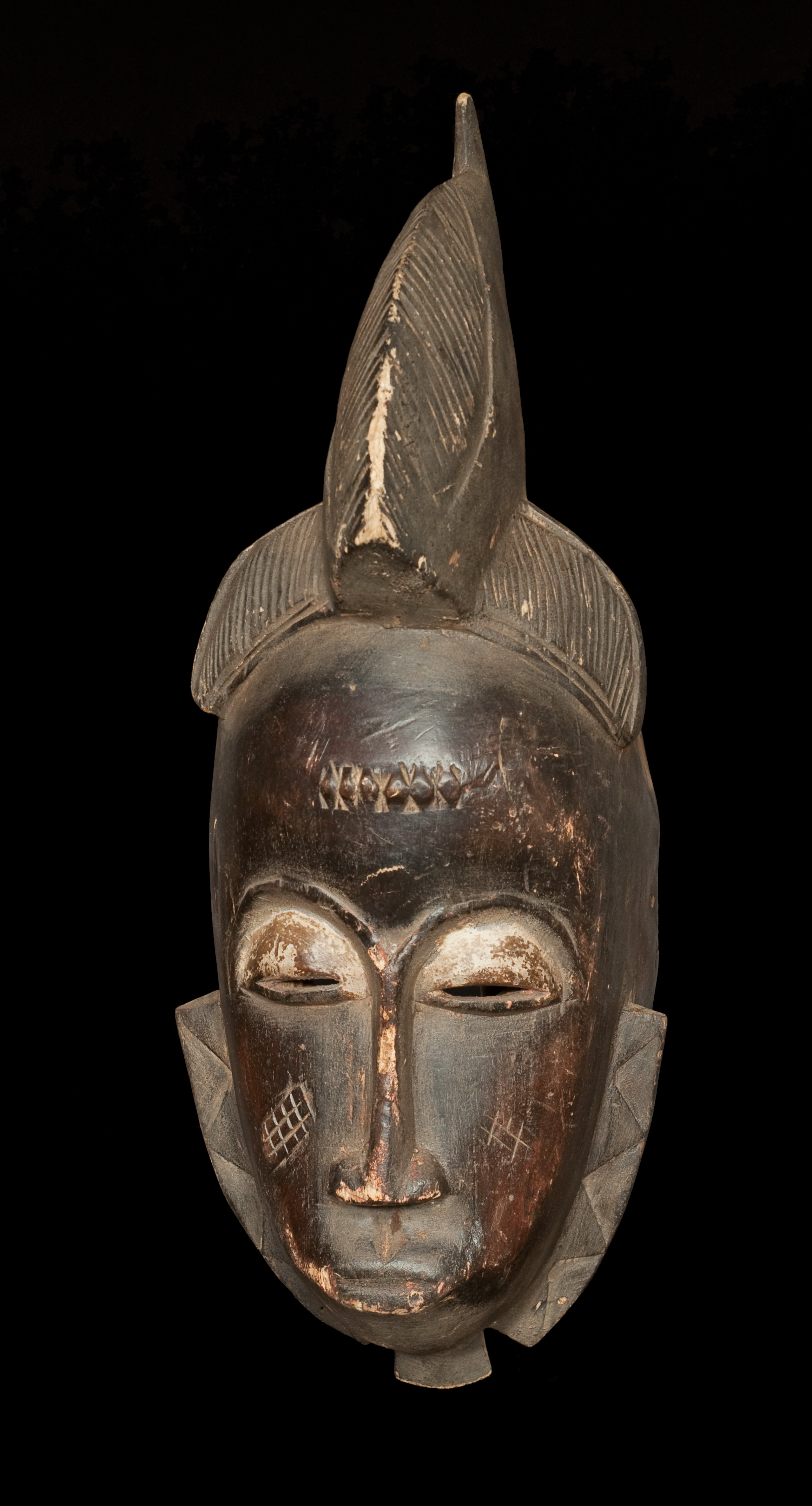 Masque baoulé